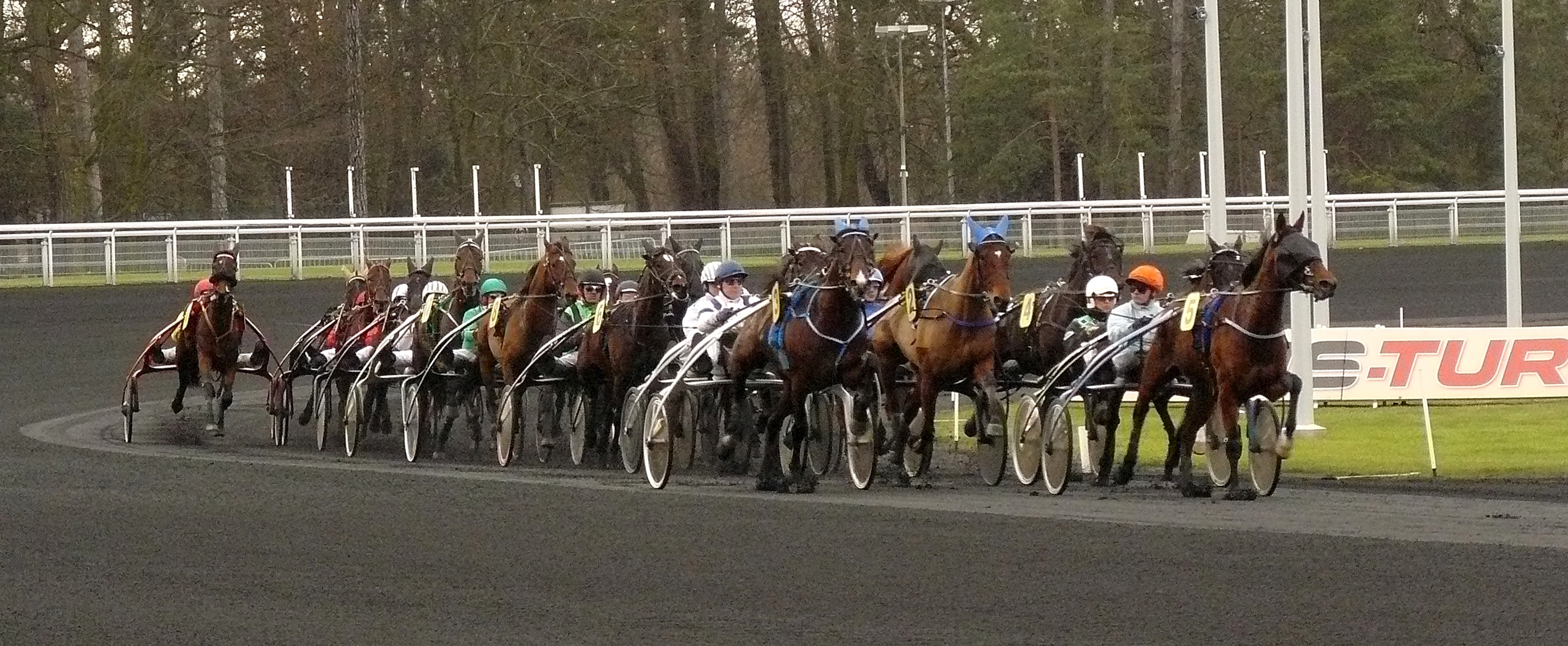 Prix de Belgique à l'hippodrome de Vincennes, le 17 janvier 2010 - Entrée de la ligne droite d'arrivée, le vainqueur (n°3) est en deuxième ligne à l'extérieur.